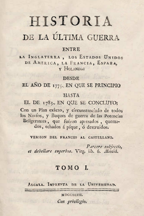 Portada del libro "Historia de la última guerra", traducción al español de la obra de Odet-Julien Leboucher (Histoire de la derniere guerre). Publicada en dos tomos, en Alcalá de Henares en 1793.